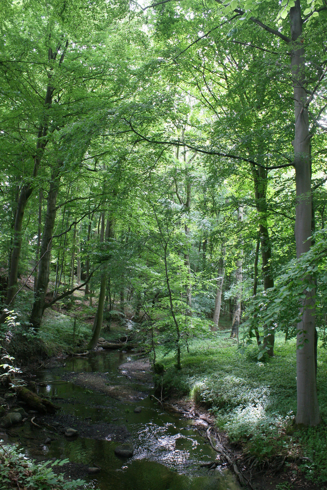 Naturschutzgebiet Beketal (N 302) im Landkreis Rostock (Mecklenburg-Vorpommern)